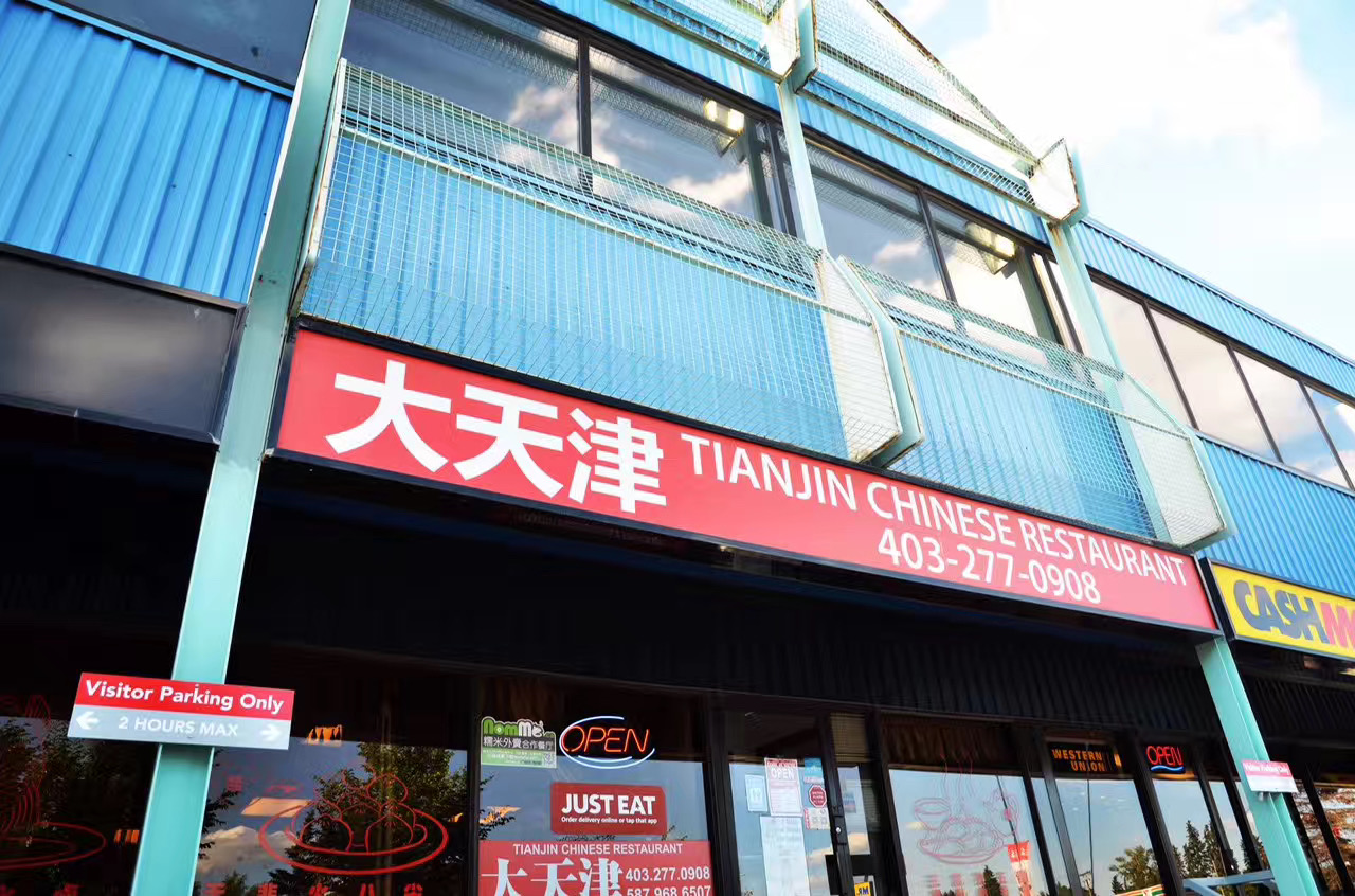 加拿大卡尔加里的一家天津风味中餐厅出售的煎饼馃子